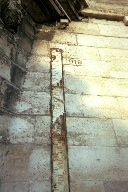 008_06 Temoin De Crue fr:1910 Pont Neuf Paris France 050202 small Melusin proprietaire des negatifs